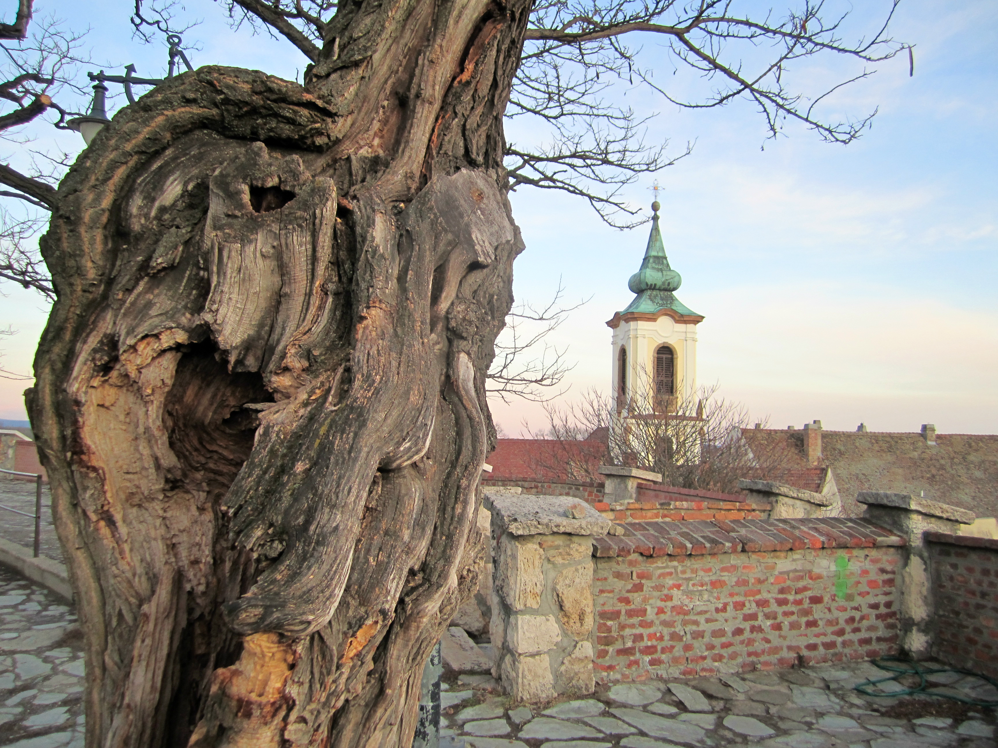 Blick über Sankt-Andre